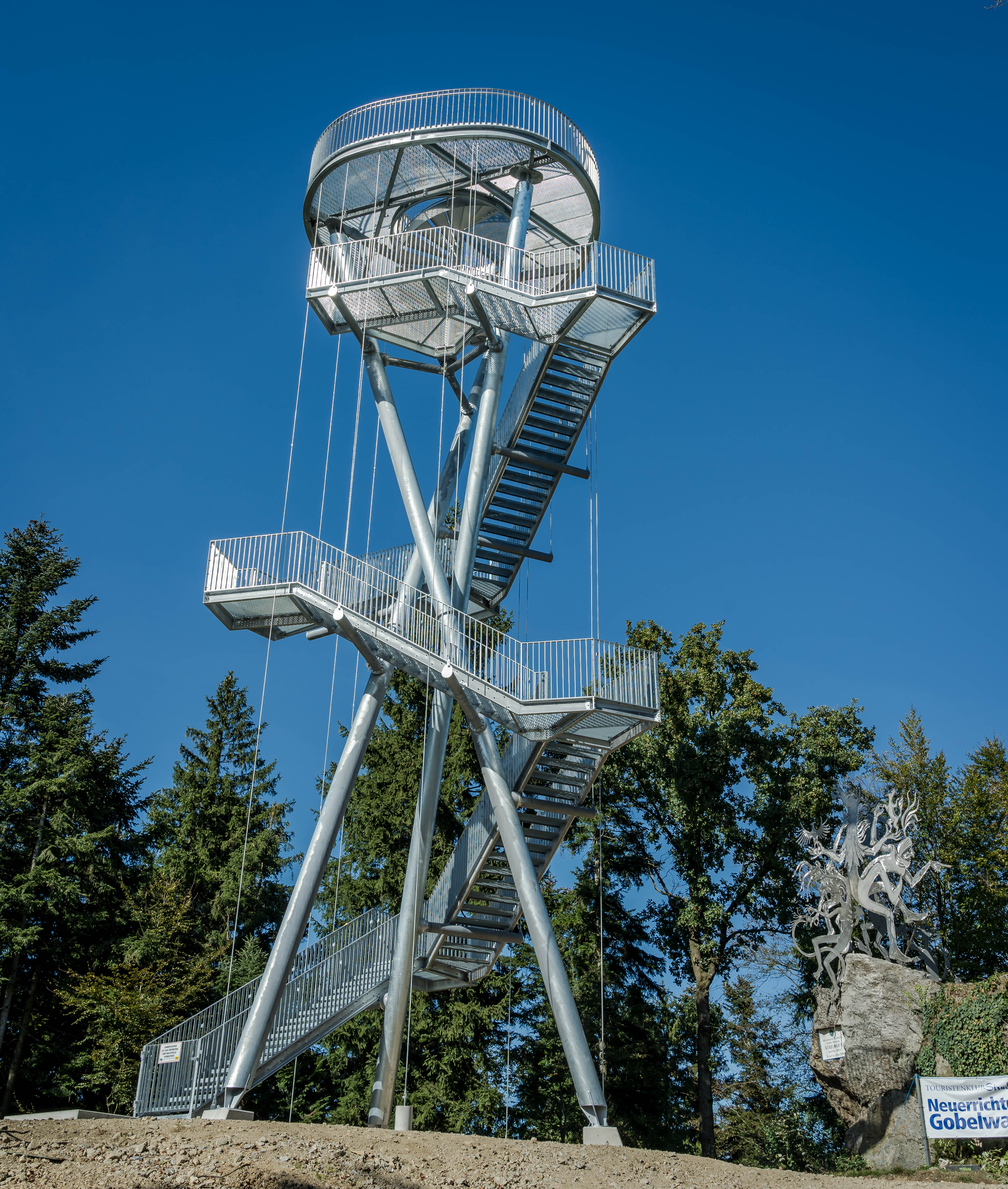 Gobelwarte